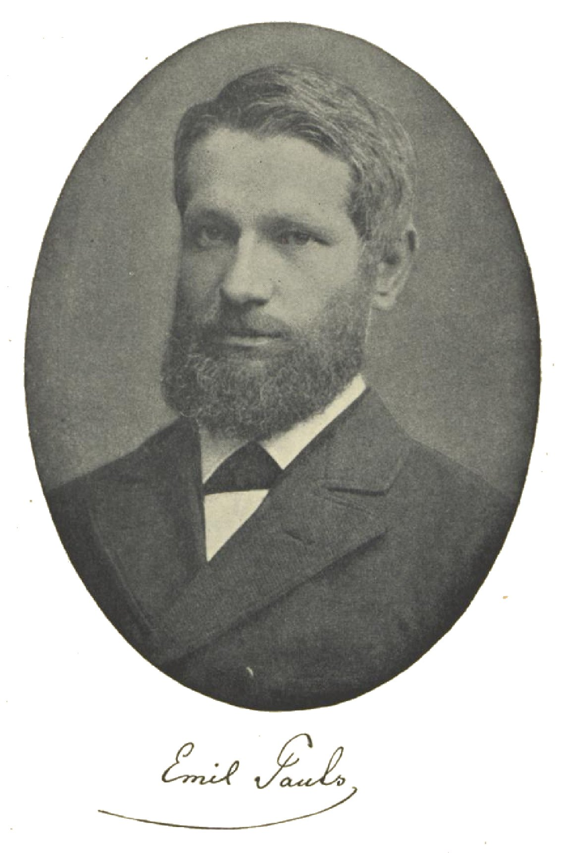 Emil Pauls (1840–1911) Description German pharmacist and historian Date of birth/death5 December 18403 August 1911Location of birth/deathKornelimünsterDüsseldorfWork periodfrom 1860 until 1911Authority control VIAF: 30714109 LCCN: nr2002001136 GND: 132982226 WorldCat aus dem Aufsatz: Richard Pick: Zur Erinnerung an Emil Pauls. In. Zeitschrift des Aachener Geschichtsvereins. 33. Band, Kaatzer, Aachen 1912 (auch als Sonderdruck)